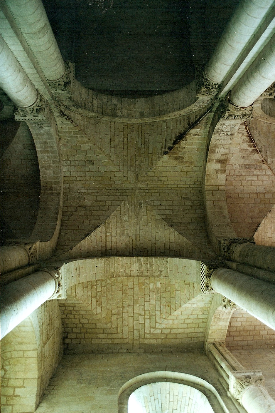 N.-D. Cunault, Südl. Seitenschiffe, 7. Joch